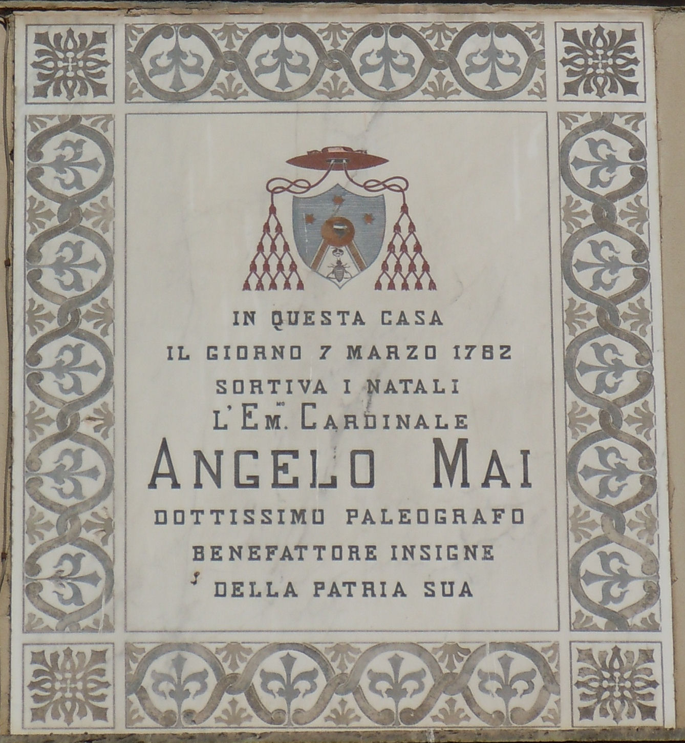 Schilpario, lapide sulla casa natale del cardinale Angelo Mai.